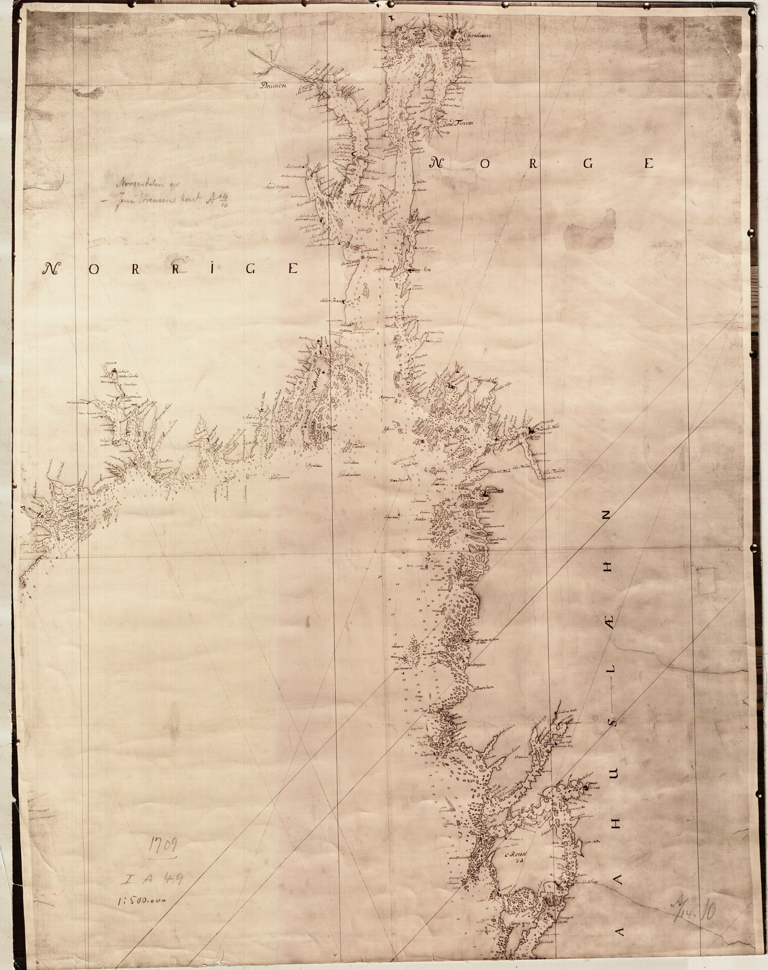 Sjøkart over Oslofjorden fra 1709. Håndtegnet i målestokk 1:500 000. Original kartstørrelse 44,7 cm x 48,3 cm. Kartet er et utsnitt av Jens Sørensens kart A 14/10, sannsynligvis utgitt av det Dansk-Norske Søecartverket, forløperen til dagens Statens kartverk Sjø. Et eksemplar befinner seg hos Statens kartverk Sjø i Stavanger.